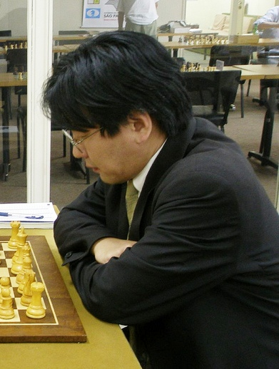 Akira Watanabe, Sao Paulo 2008